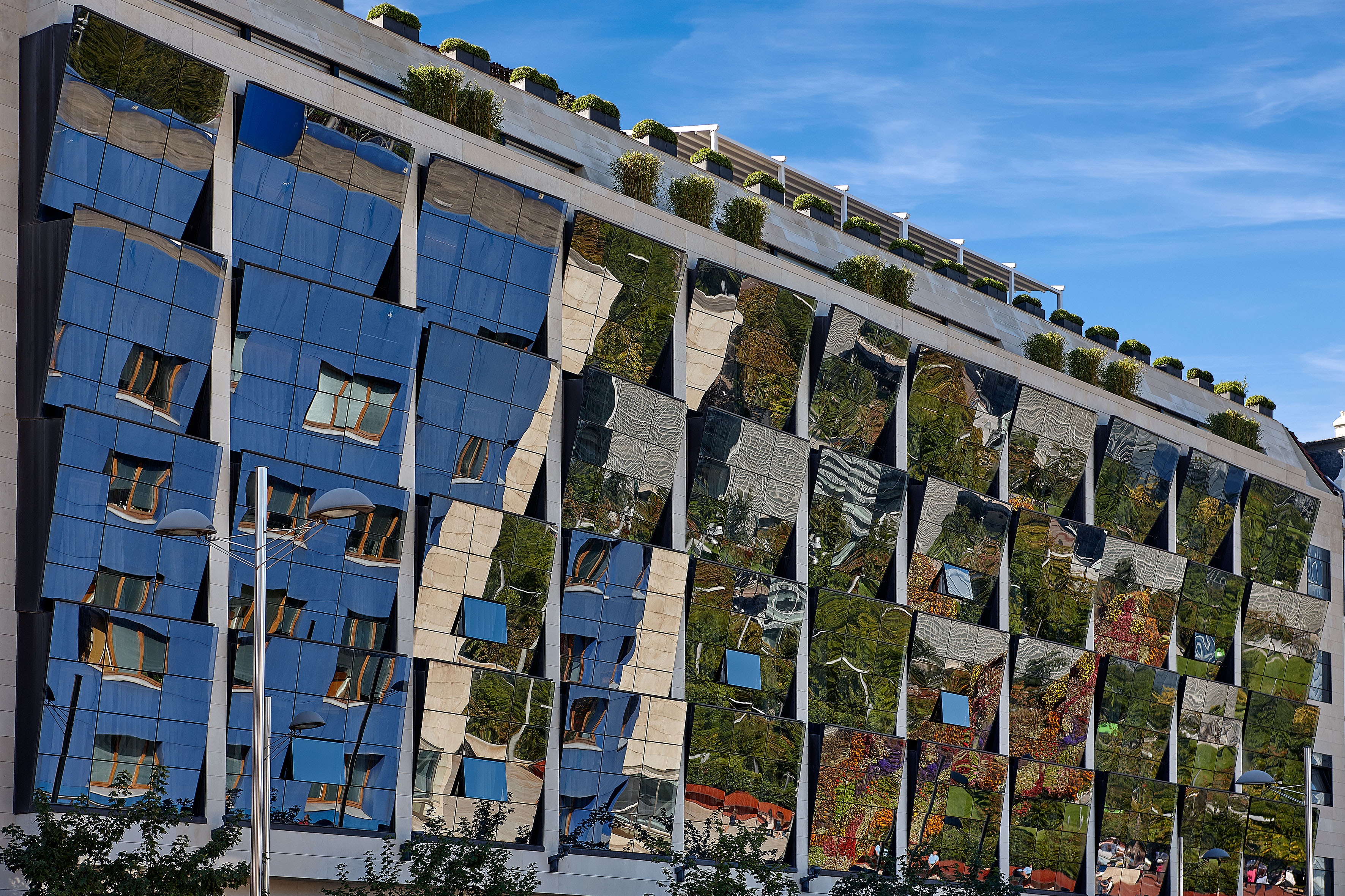 Gran Hotel Domine is situated in front of the Guggenheim Museum of Bilbao. Is a 5-star luxury hotel.